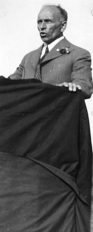 Martin Tranmæl på talerstolen. Datering 1935 - 1940 (ca) Fotograf ukjent person Avbildet person Tranmæl, Martin Olsen. Bildenummer OB.F06517a. sjon Oslo Museum, Byhistorisk samling. Lisensiert under en Creative Commons 3.0 lisens.